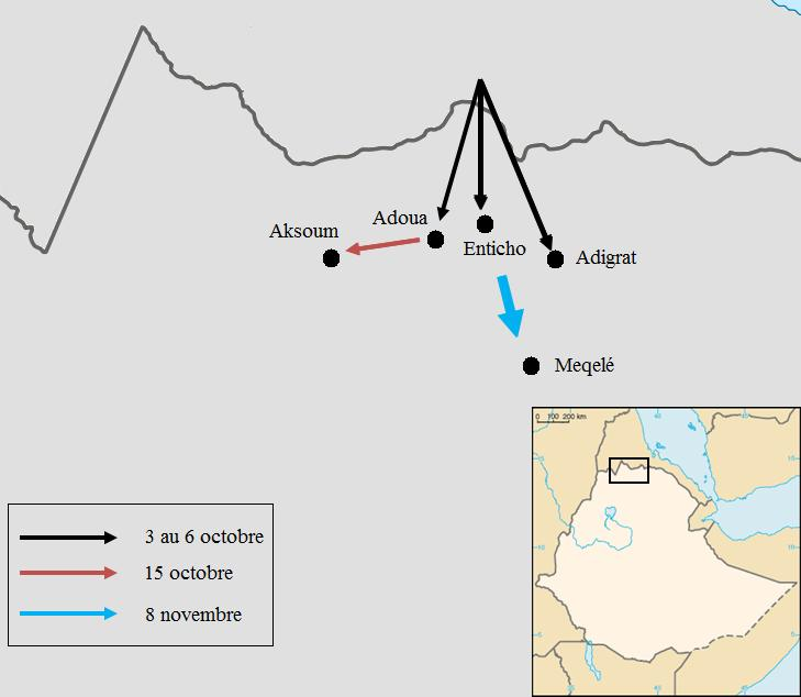 Invasion de De Bono en 1935 dans le Tigray (Ethiopie)